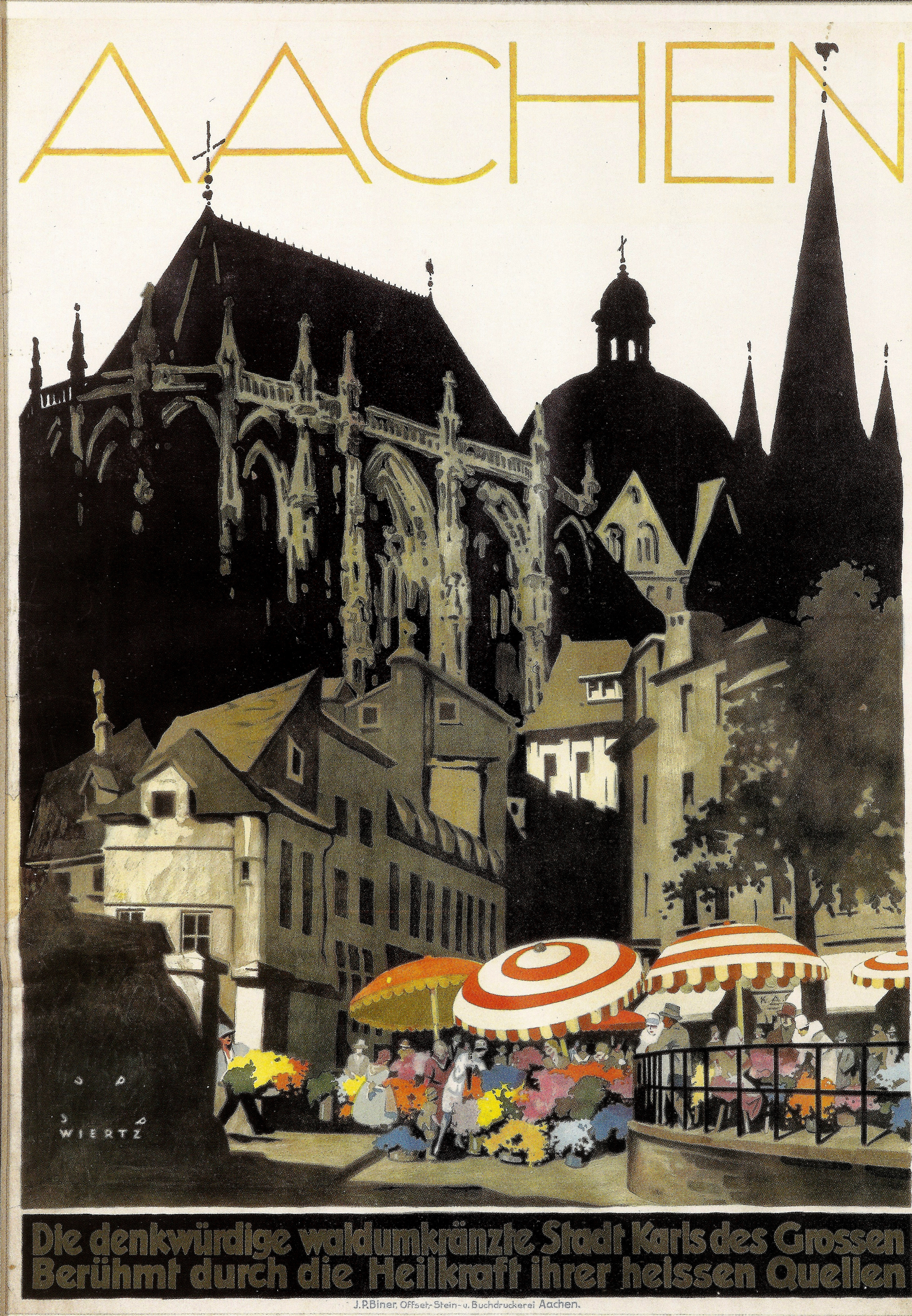 Werbeplakat für Aachen im Auftrag des Verkehrsvereins in Aachen